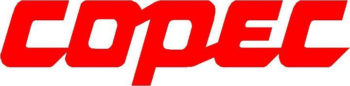 Logo de Copec, 1983-1986